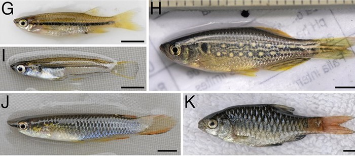 Daftar pesaing ikan zebra dalam berburu makan